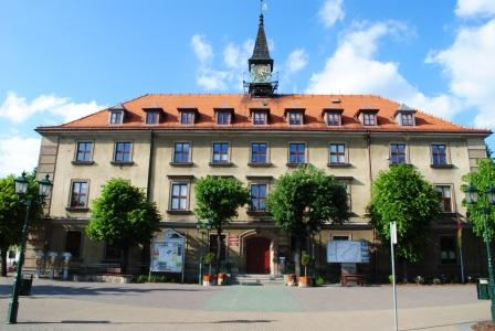 Ratusz swarzędzki